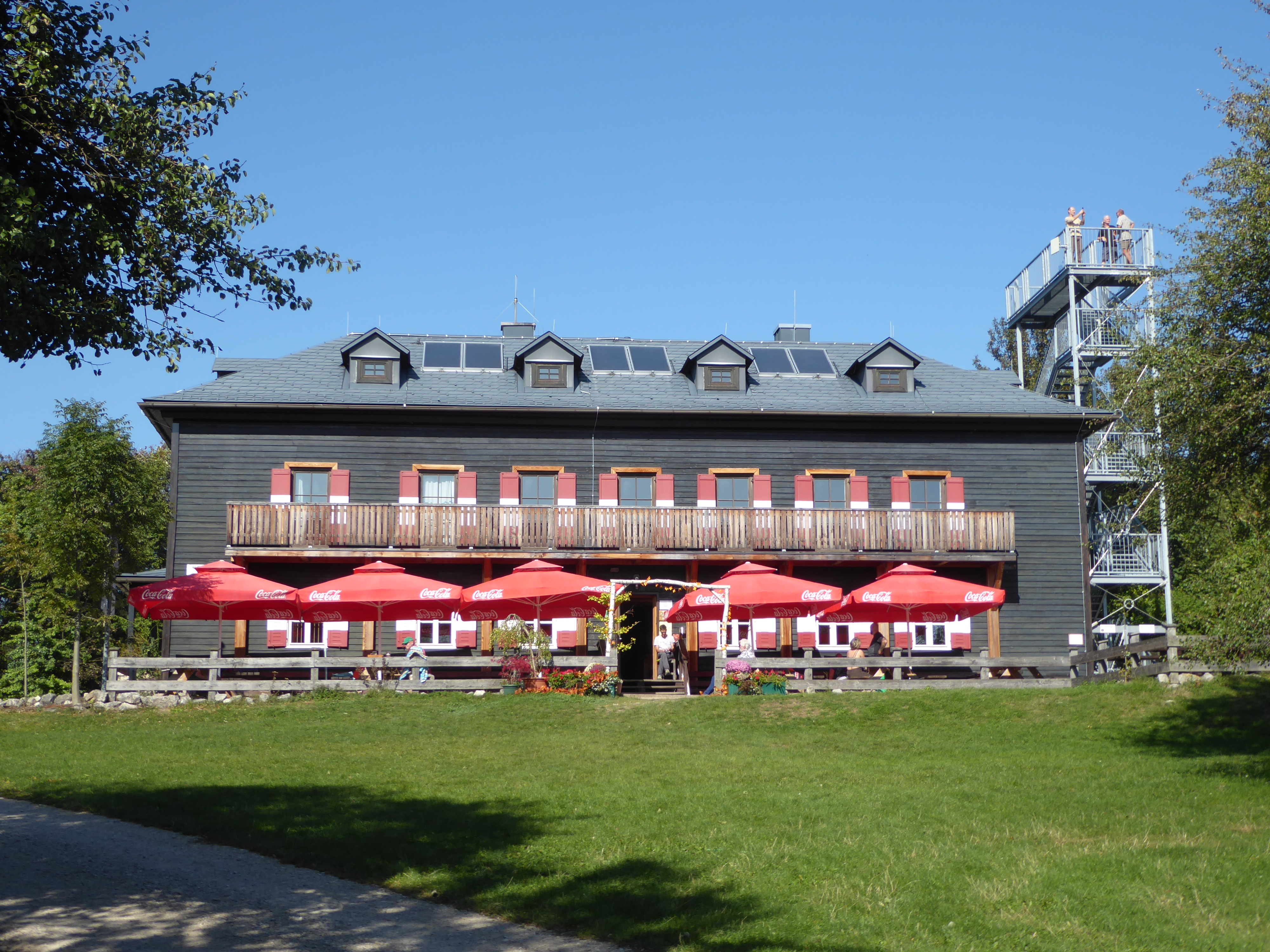 Peilsteinhaus, Weissenbach an der Triesting, Niederösterreich